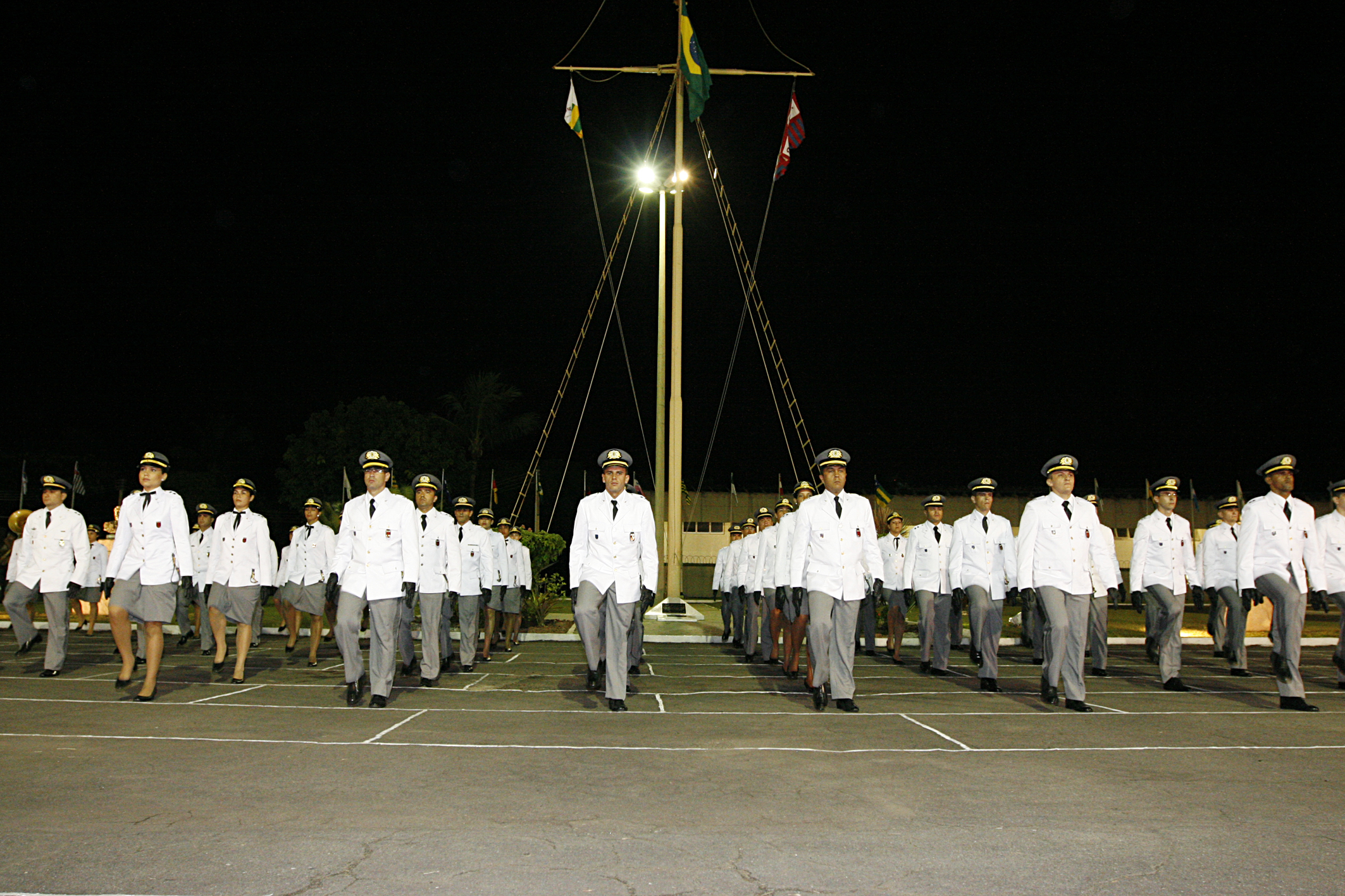 Solenidade de formatura do curso de formação de oficiais do quadro complementar 2009 da Escola de Administração do Exército. Turma Marechal Deodoro da Fonseca.